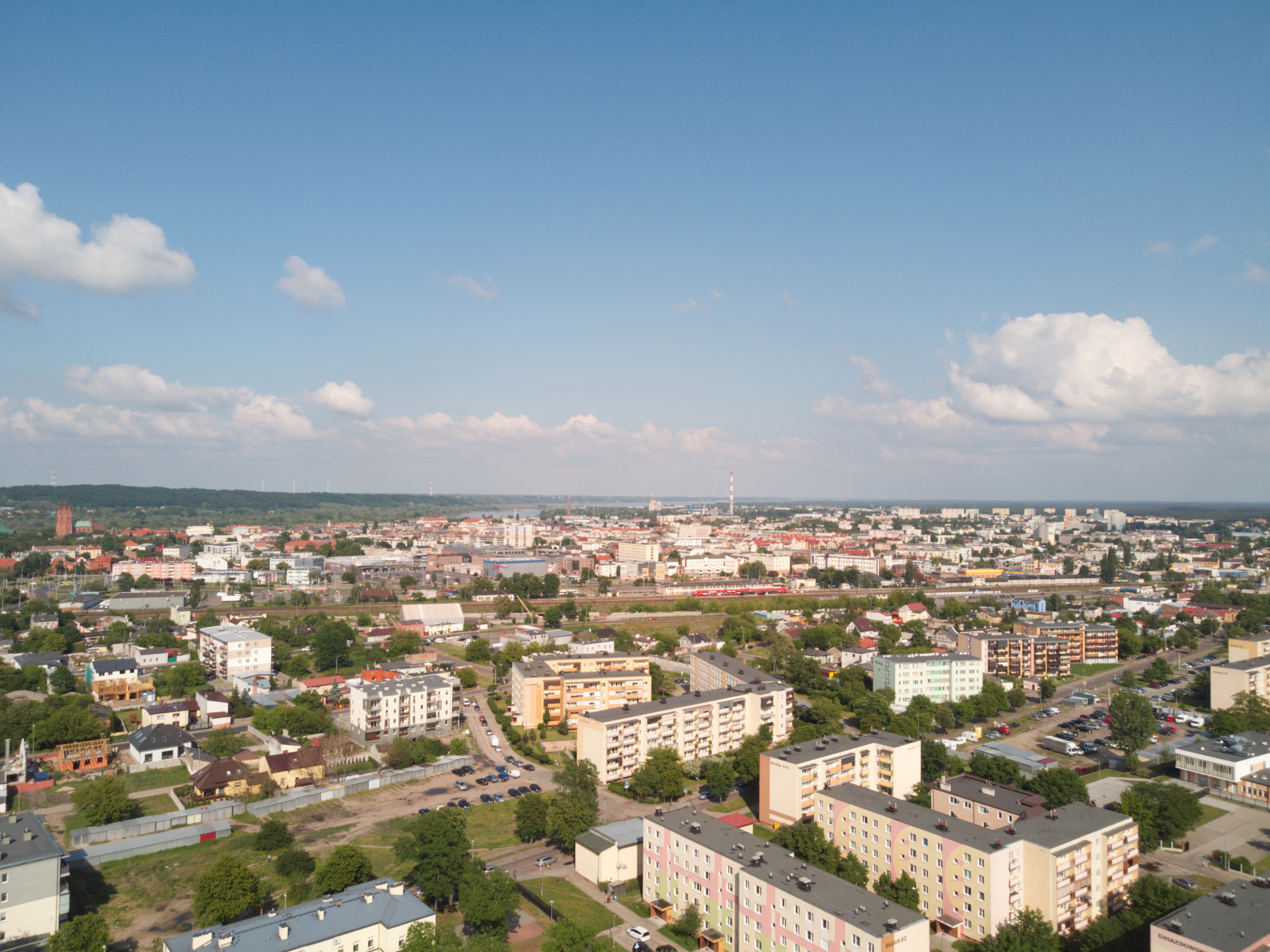 Styk Południa ze Śródmieściem (2020 r.)